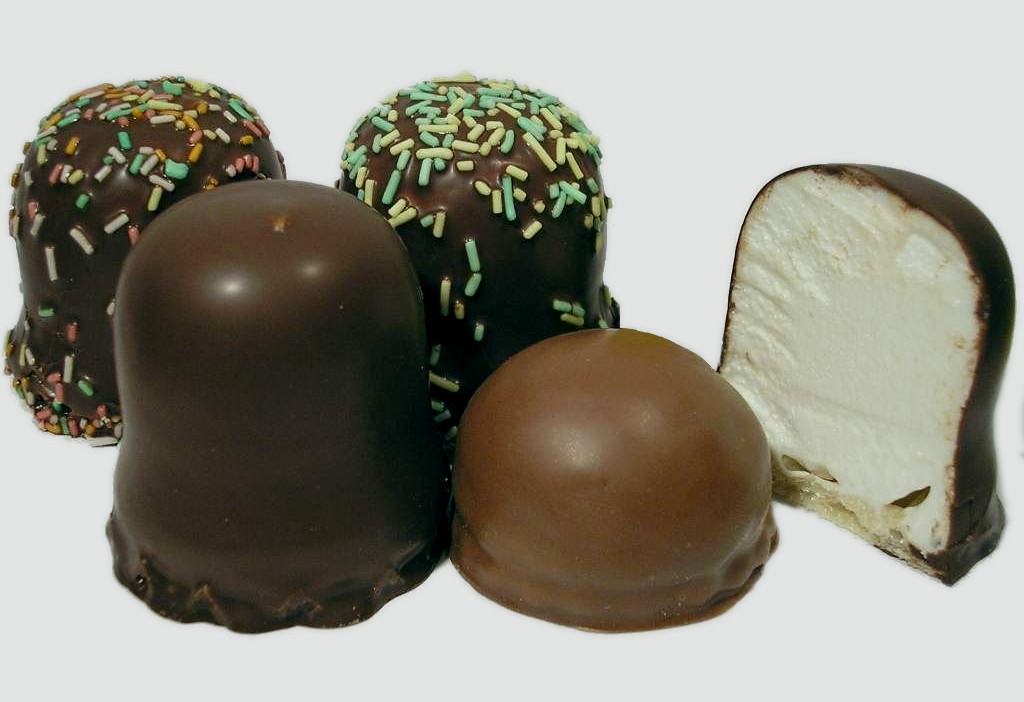 קרמבו